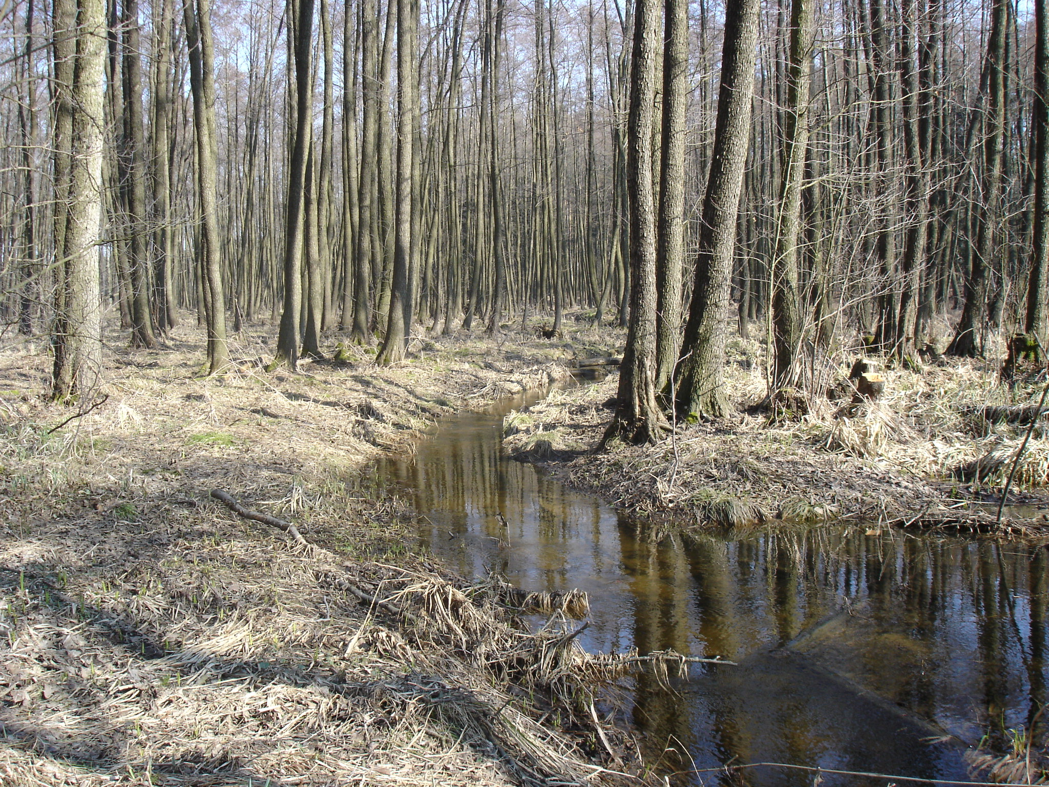 Přírodní památka Roudnička a Datlík zahrnuje rybníky Roudnička a Datlík zde listnatý lužní les u rybníka Datlík